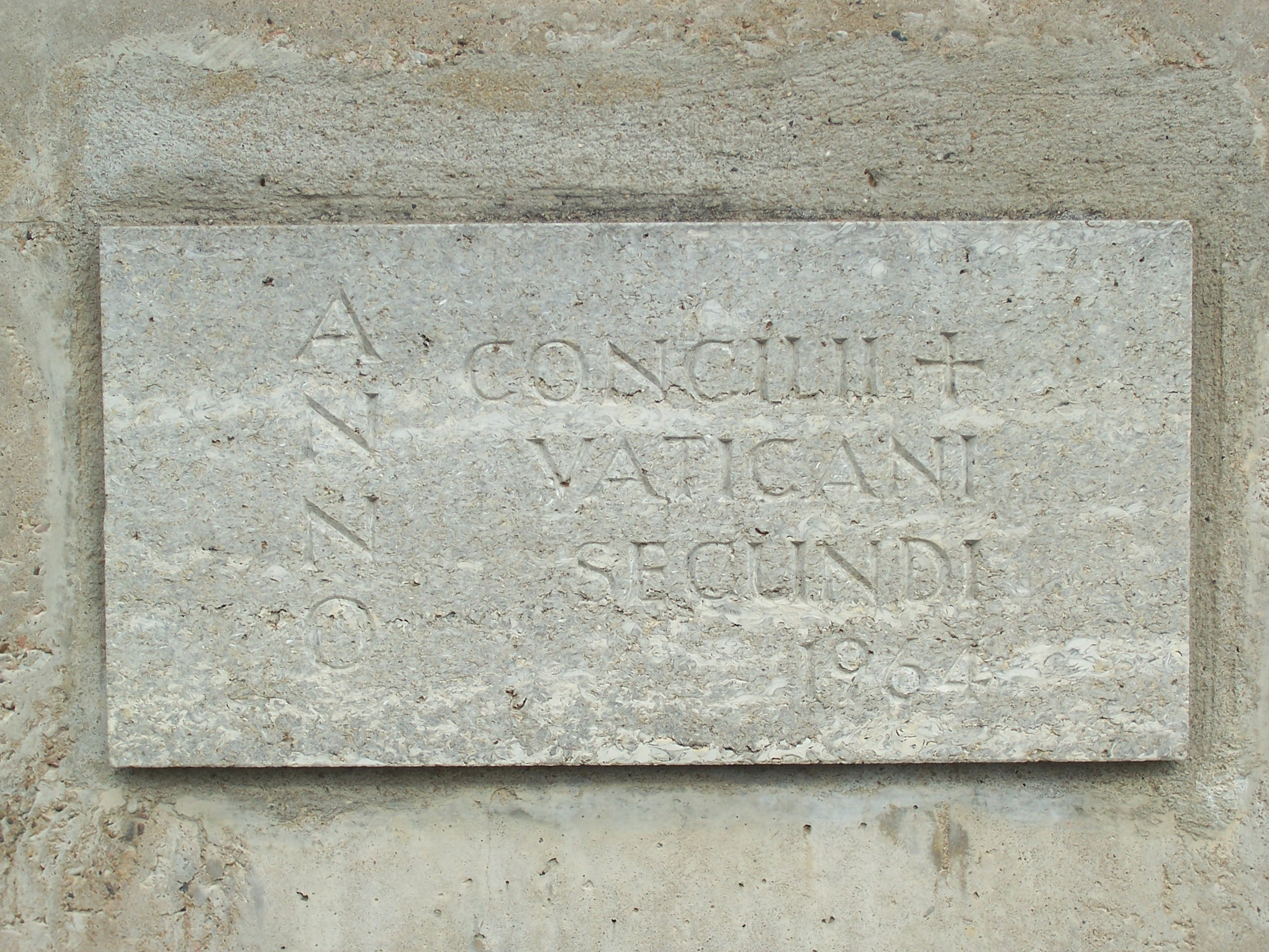 Grundstein der Kirche St. Bonifatius (Tauberbischofsheim), gelegt am 8. November 1964. Inschrift: „ANNO CONCILII + VATICANI SECUNDI 1964“.